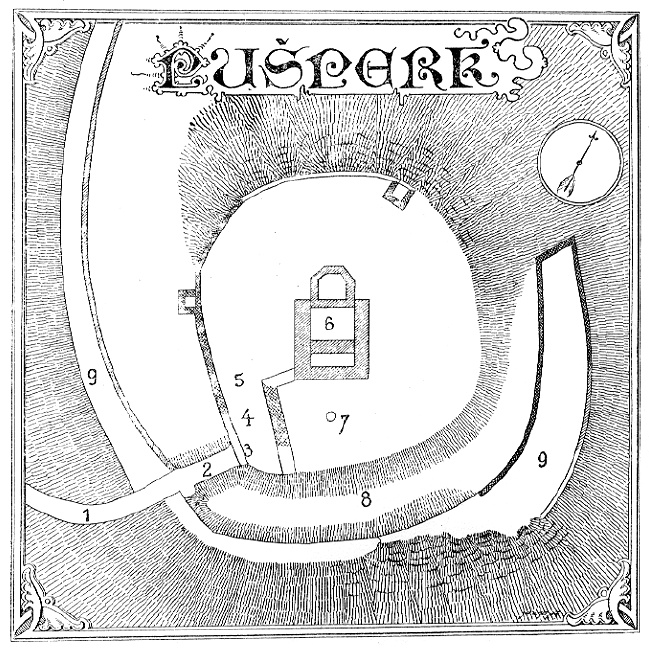 Pušperk – půdorys hradu od Vojtěch Krále z Dobré Vody publikovaný roku 1891; Popis: 1 – cesta, 2 – zasypaný příkop, 3 – první brána, 4 – parkán, 5 – druhá brána, 6 – kaple, 7 – studna, 8 – příkop, 9 – valy